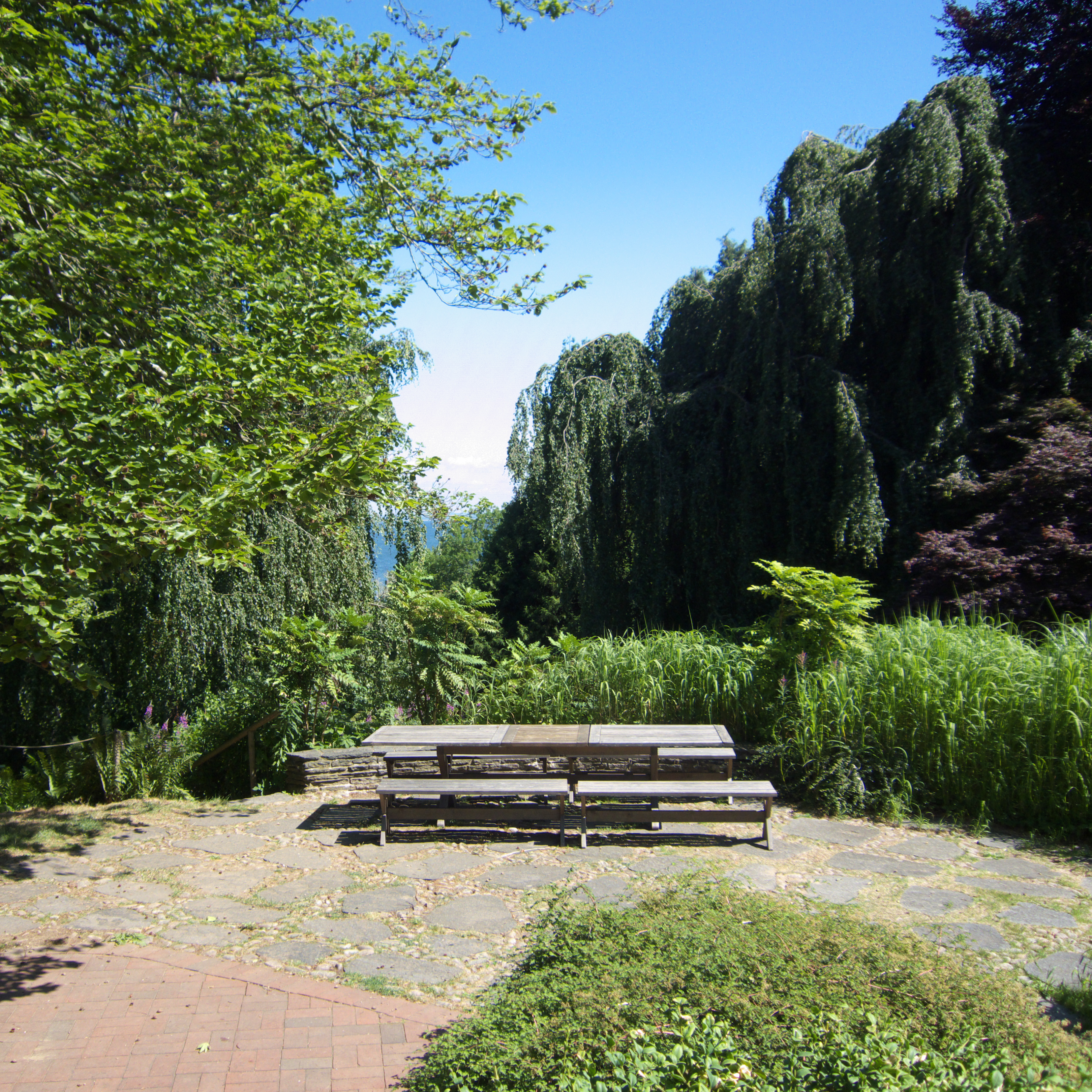 Norrvikens trädgårdar - utsikt mot norr